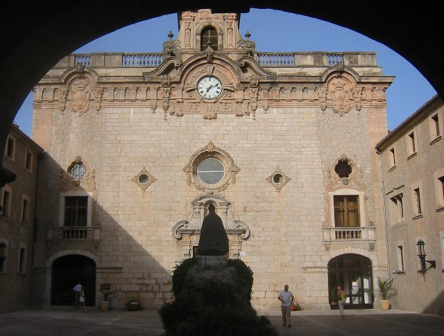 Fassade des Santuario de Lluc auf Mallorca. Eigenes Bild, gemeinfrei. Juli 2005.